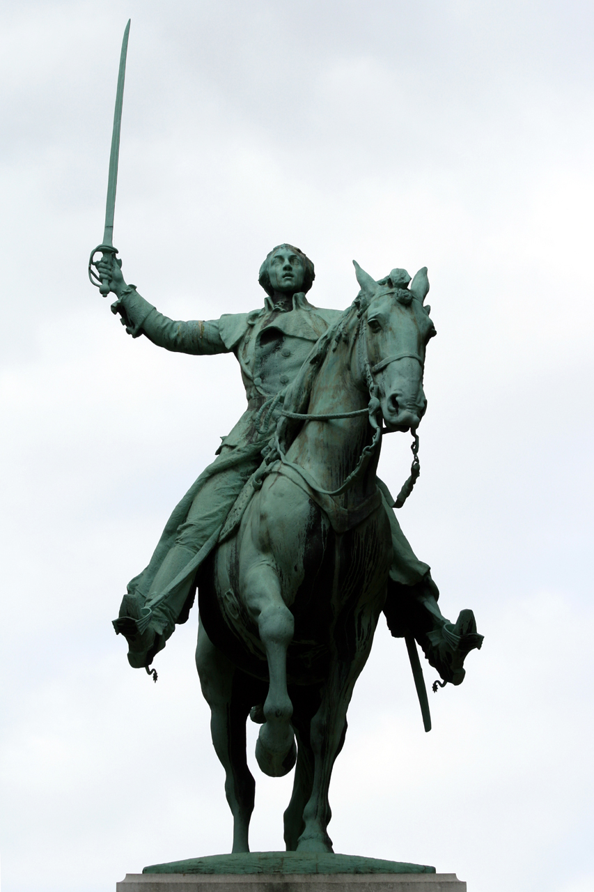 Statue de Lafayette à Paris